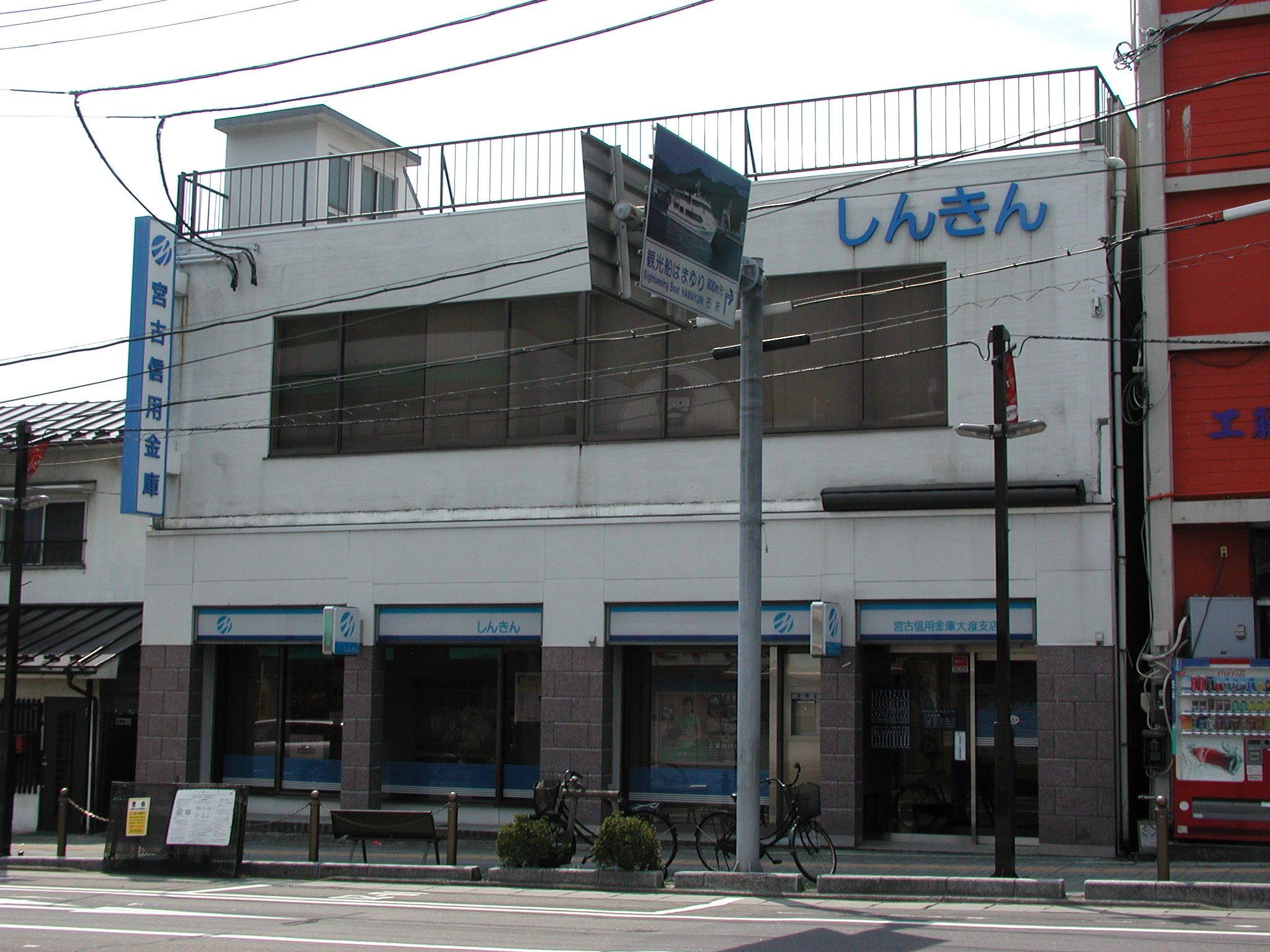 宮古信用金庫 大渡支店（店番：022）